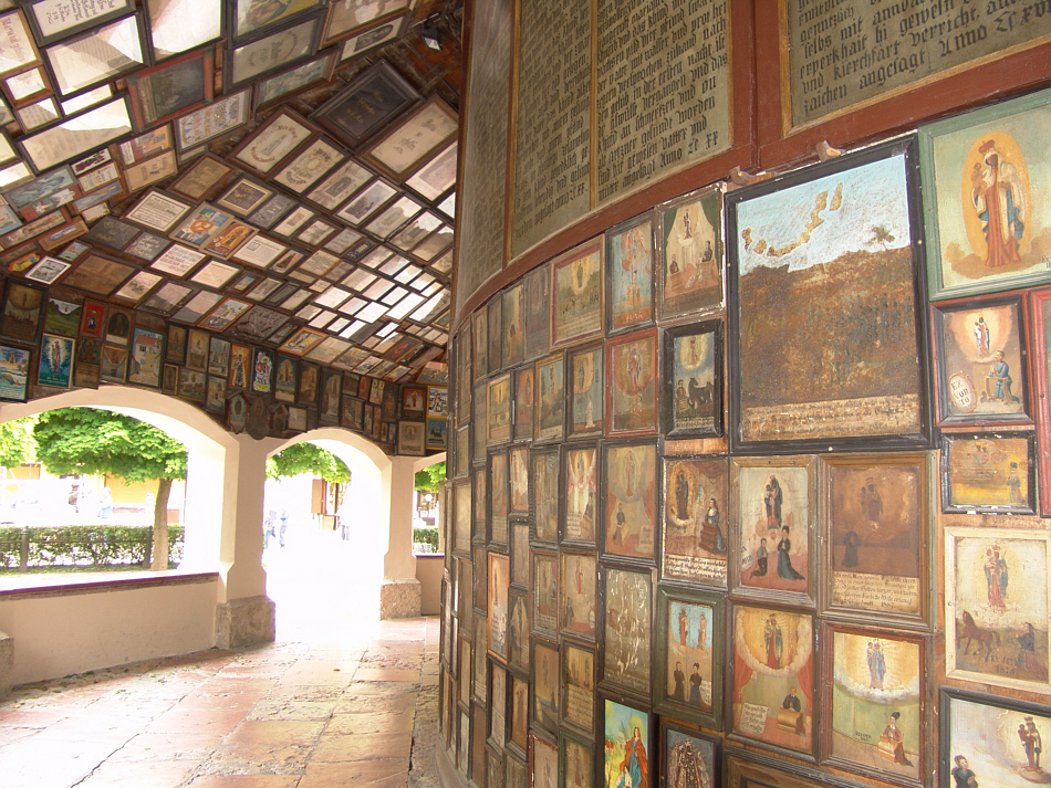 Gnadenkapelle in Altötting. Der Rundgang um die Kapelle ist mit Votivbildern behängt. (2005)